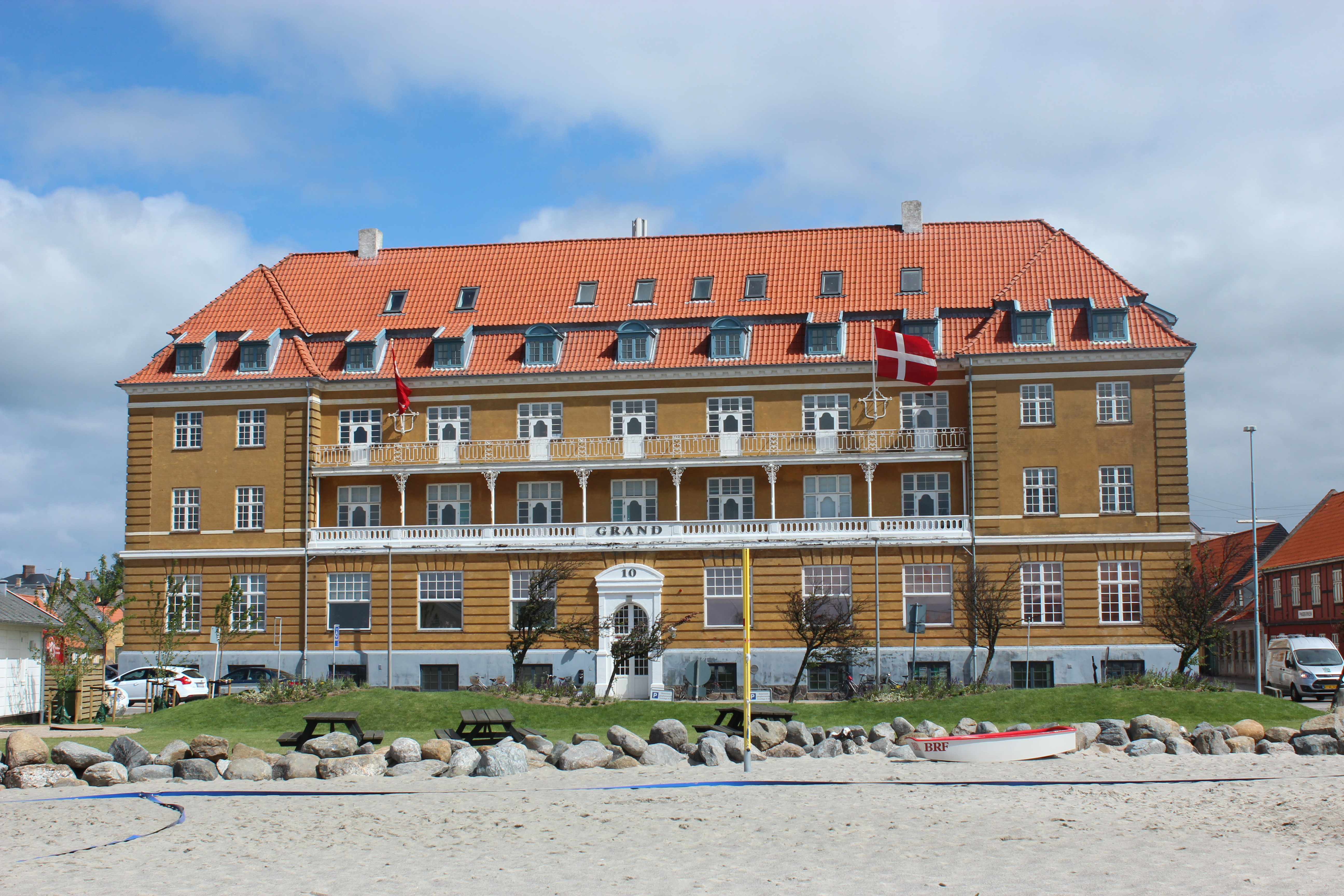 Tidligere hotel i Kalundborg ned til havnen.